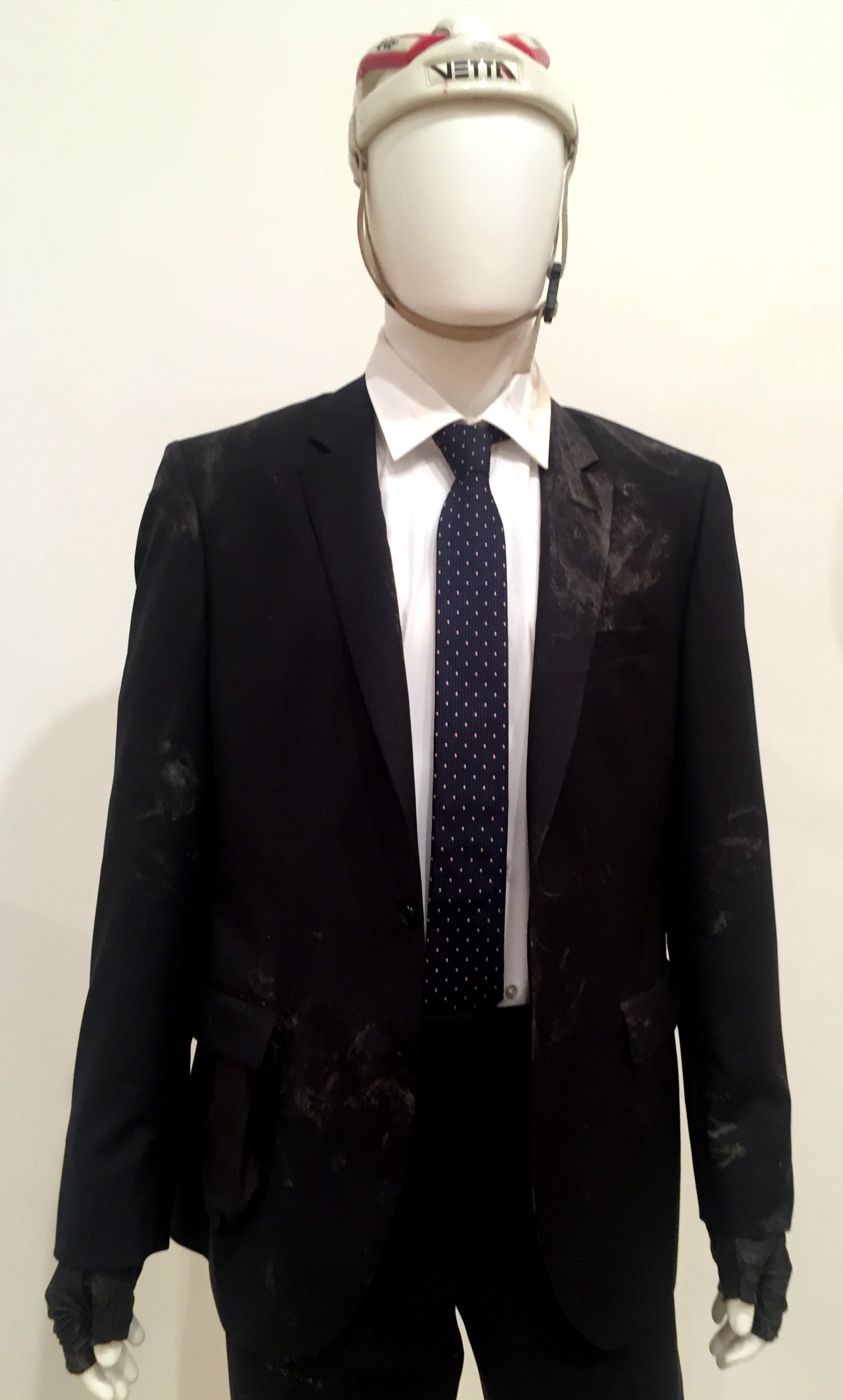 Habillement de Jan Fabre utilisé lors de son non-record.